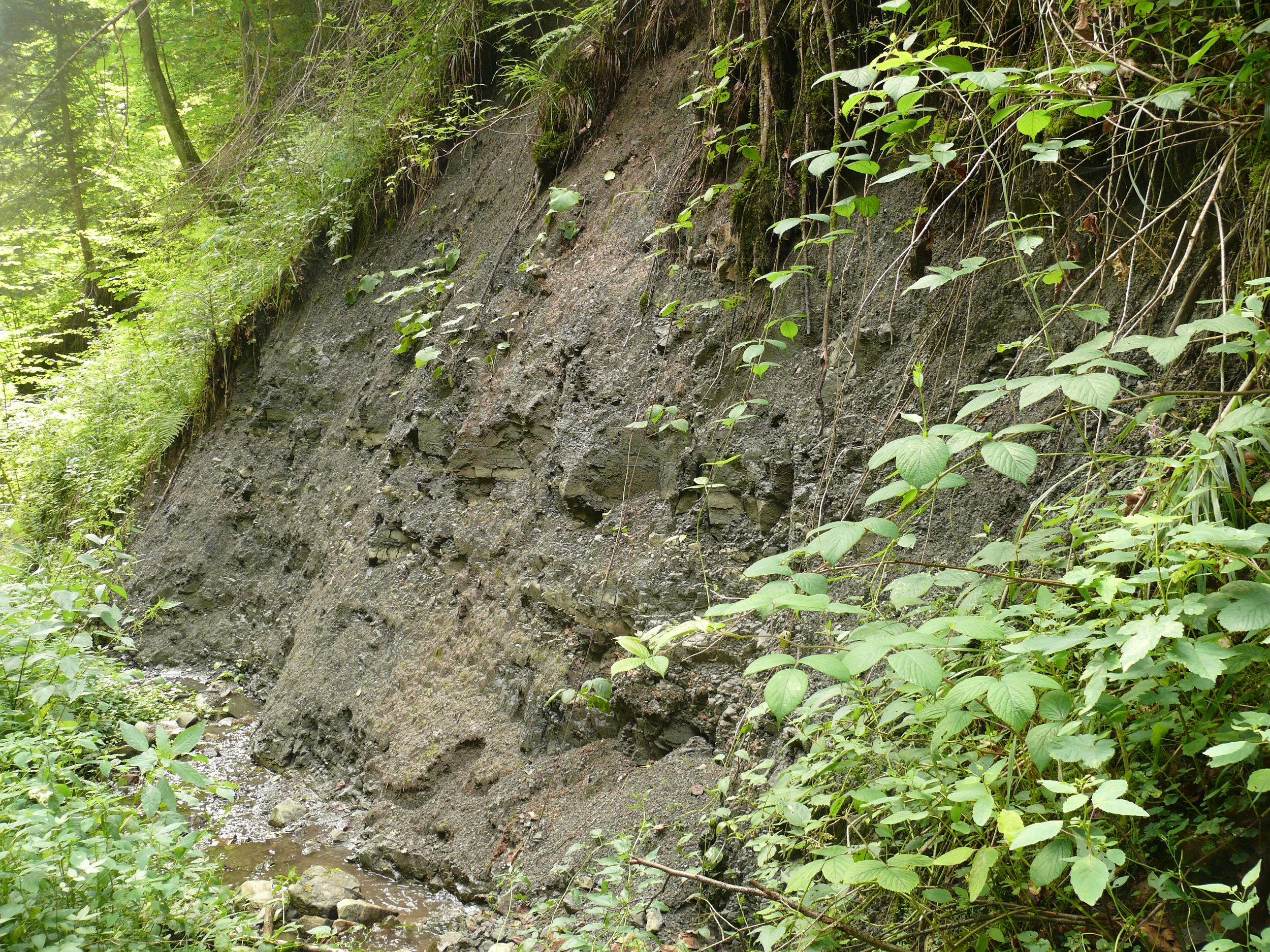 Teil des Typusprofils der Mainhardt-Formation (Obere Bunte Mergel) am Kümmelsbach (Kümmerlesbach) bei Mainhardt